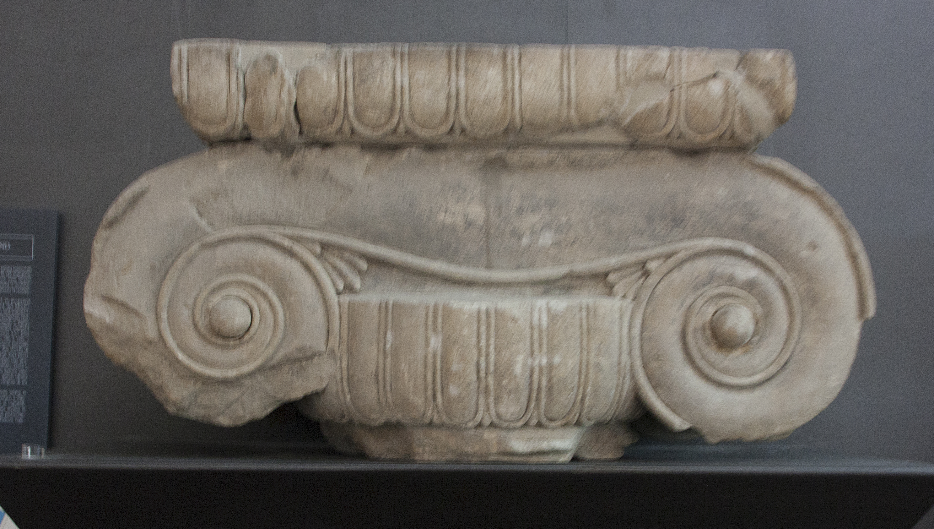 500 a.C. ca da cisterna Castellano